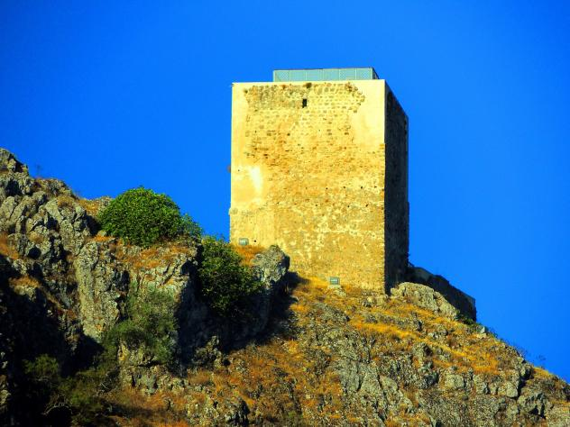 36°57'59.4"N 5°13'55.0"W